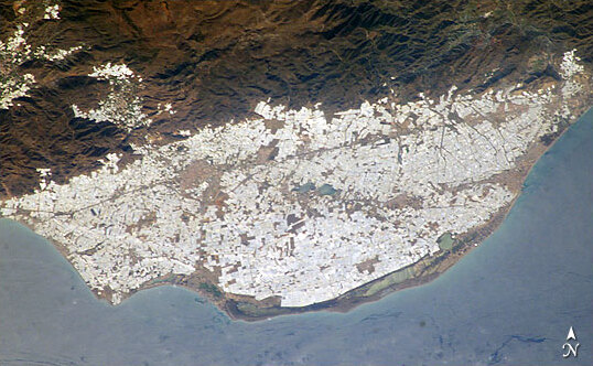 Campo de Almería, Vista Satelite